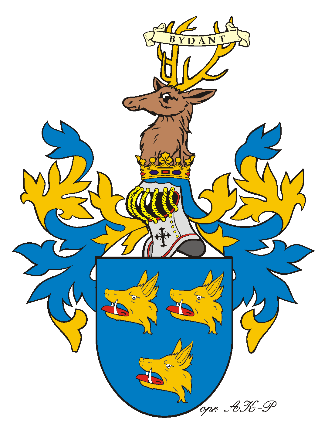 herb Bydant klanu Gordon, opis wg Burke's Peerage